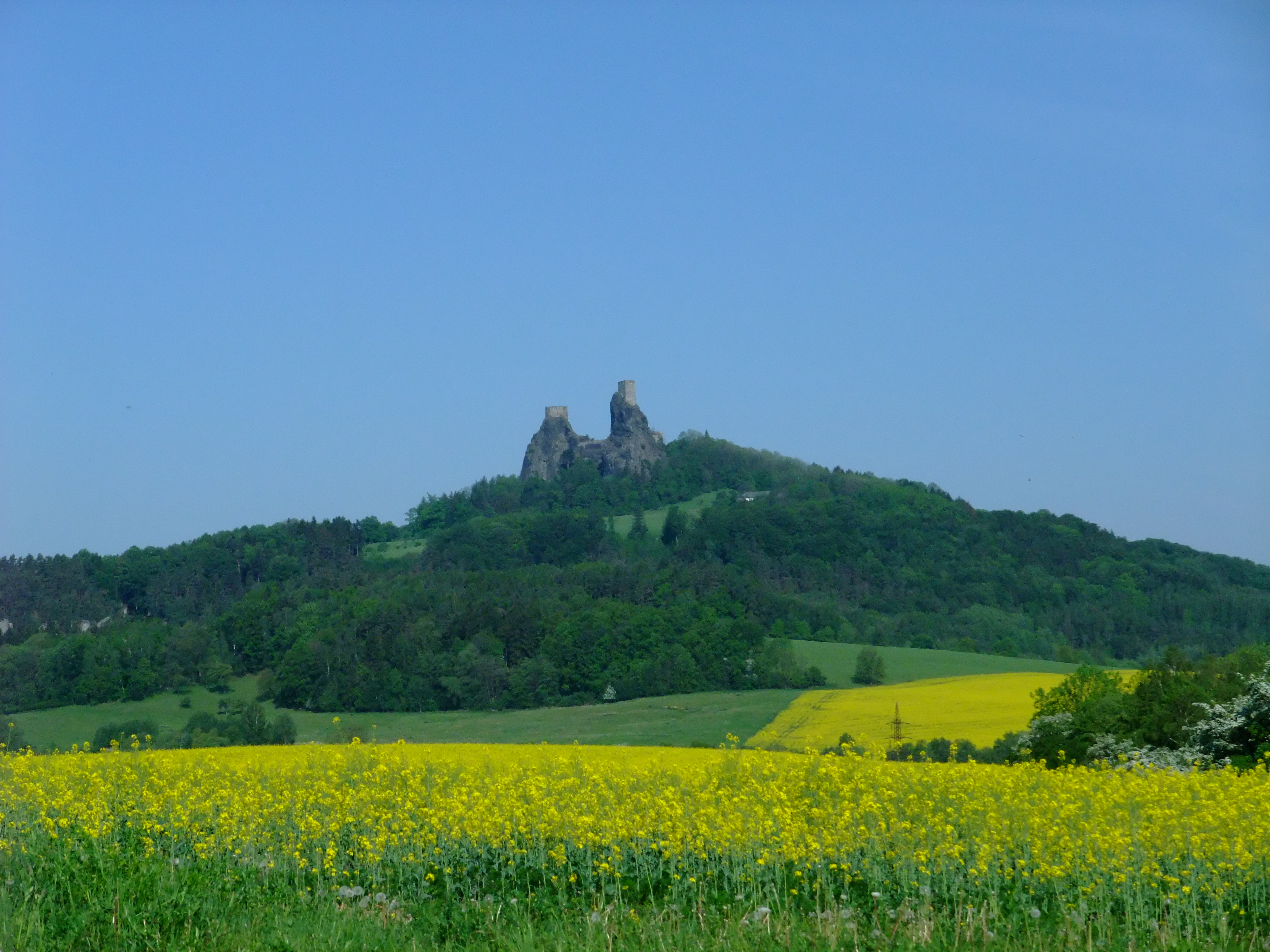 Hrad Trosky, Troskovice.